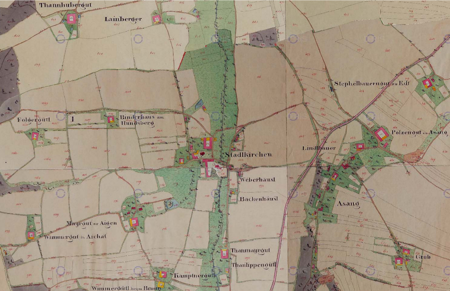 Landkarte von Stadlkirchen aus dem Jahr 1850